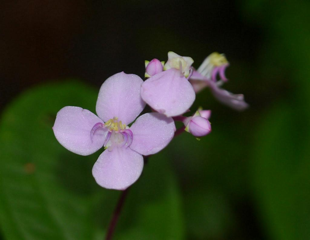 Bredia hirsuta：ハシカンボク 2015/08/26 沖縄本島：Okinawa Island, Japan